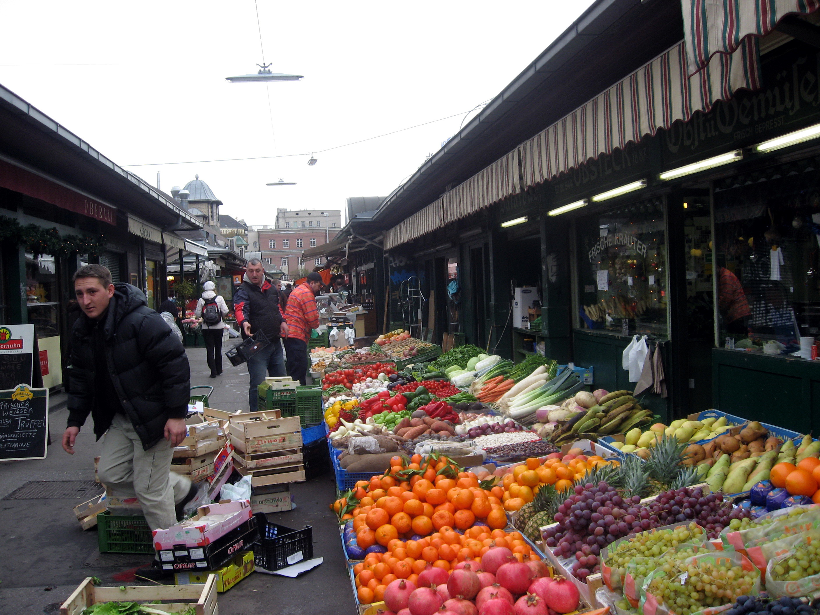 Vídeň, tržnice